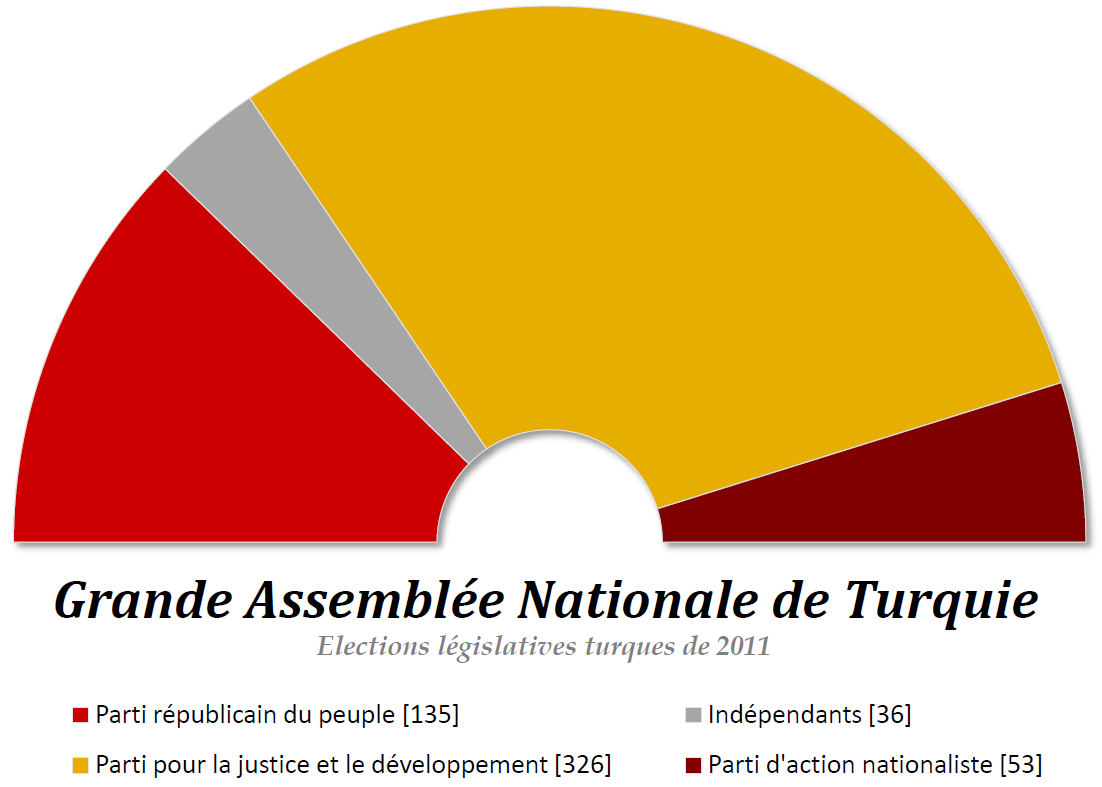 Composition politique de la Grande Assemblée Nationale de Turquie à l'issue des élections législatives de juin 2011.